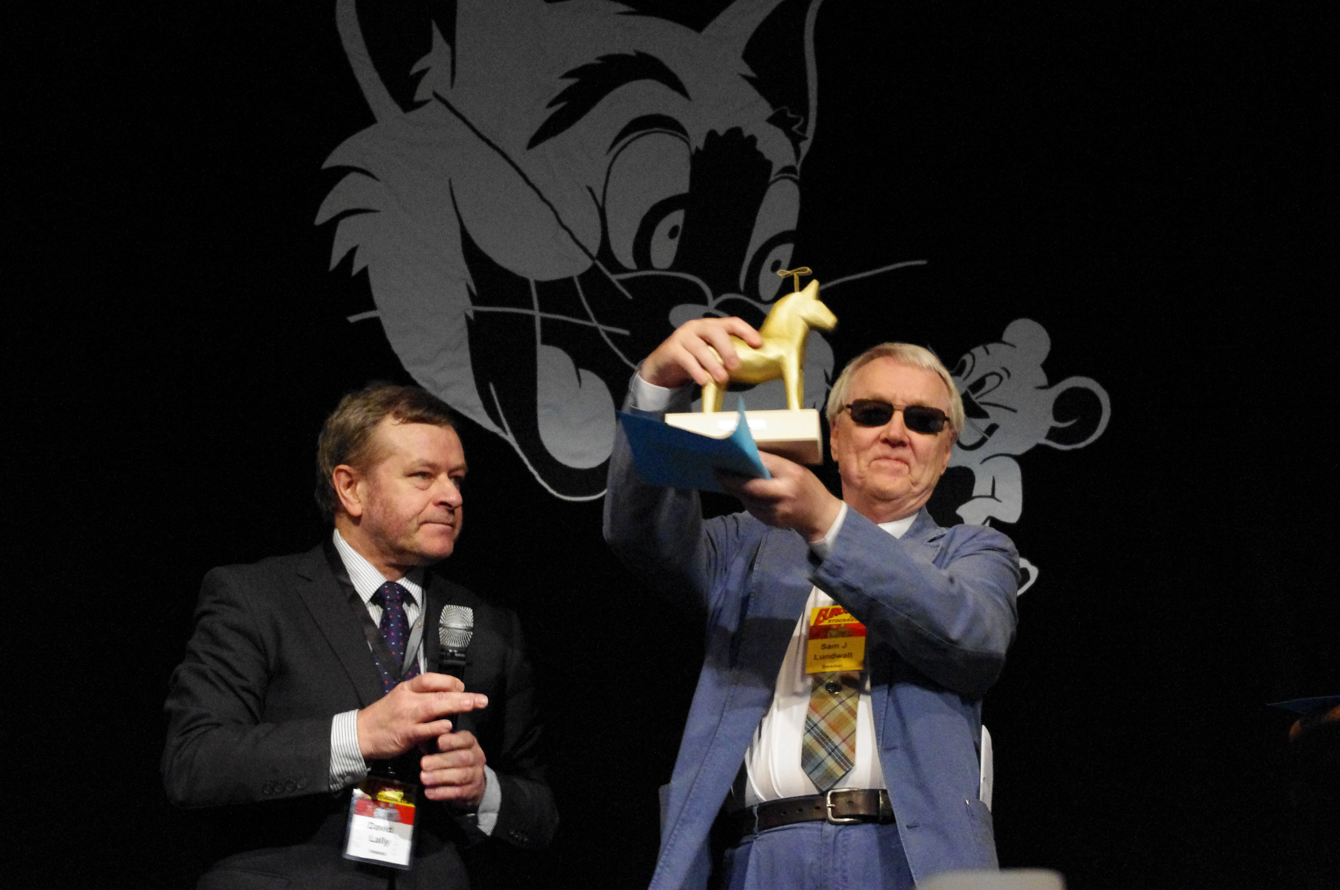 Sam J. Lundwall tar emot ESFS: pris som "European Grand Master" på Eurocon i Stockholm, 2011.